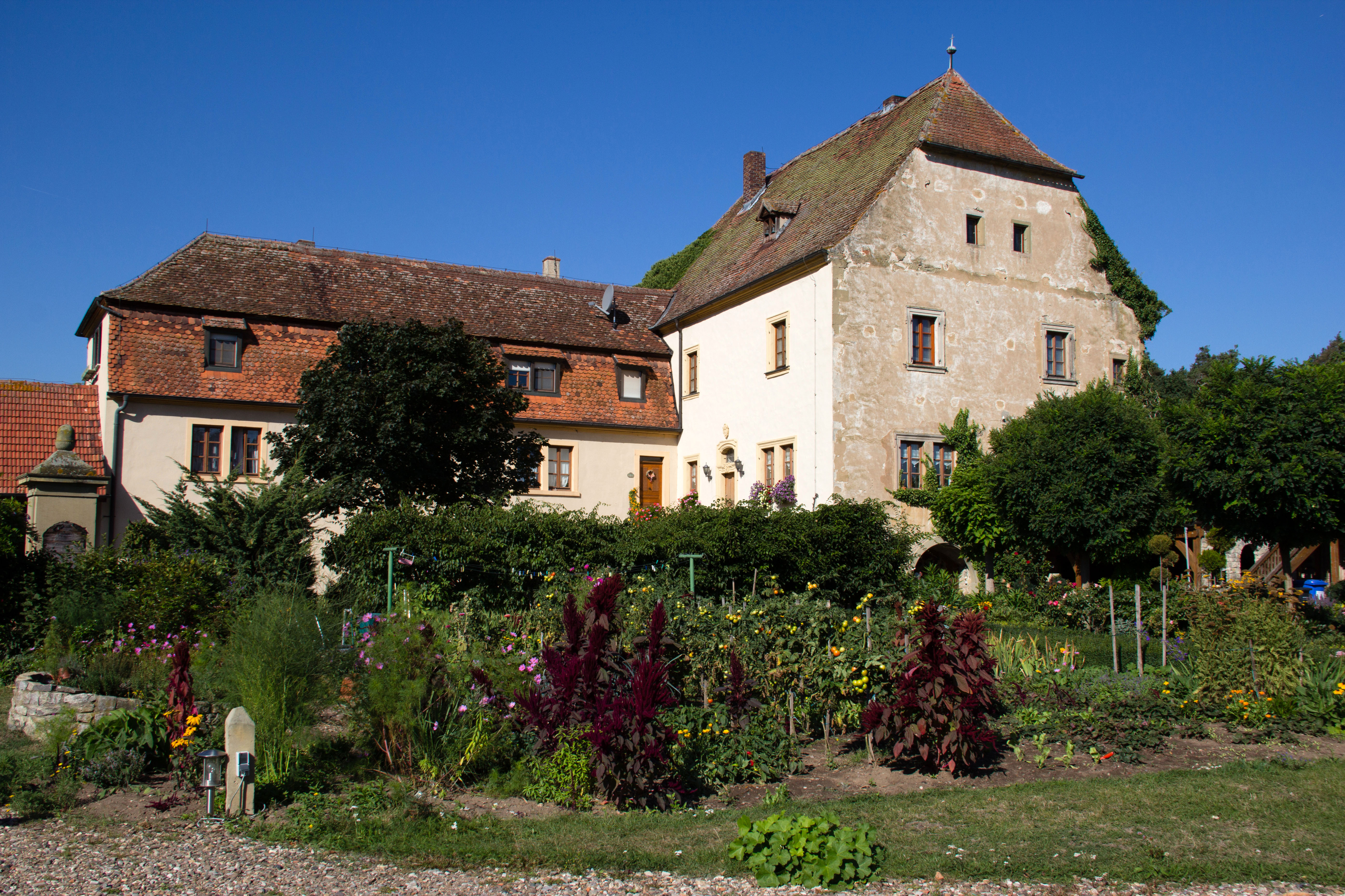 Elgersheimer Hof